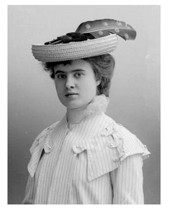 Představitelka sociálních organizací v ČSR Marie Záhořová, vnučka Boženy Němcové